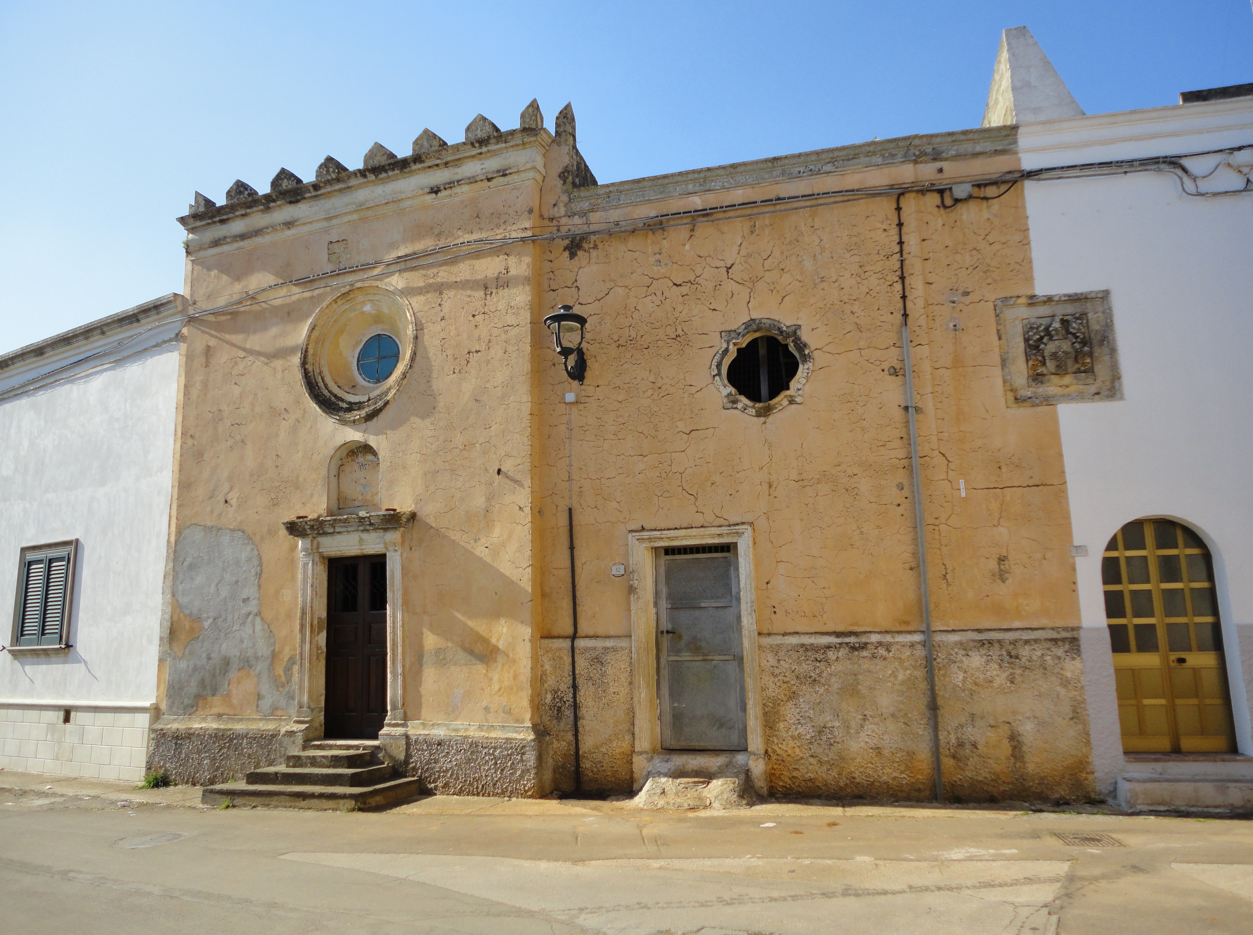 Oratorio San Michele Tiggiano, Lecce